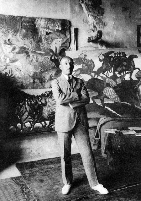 Дмитрий Семёнович Стеллецкий